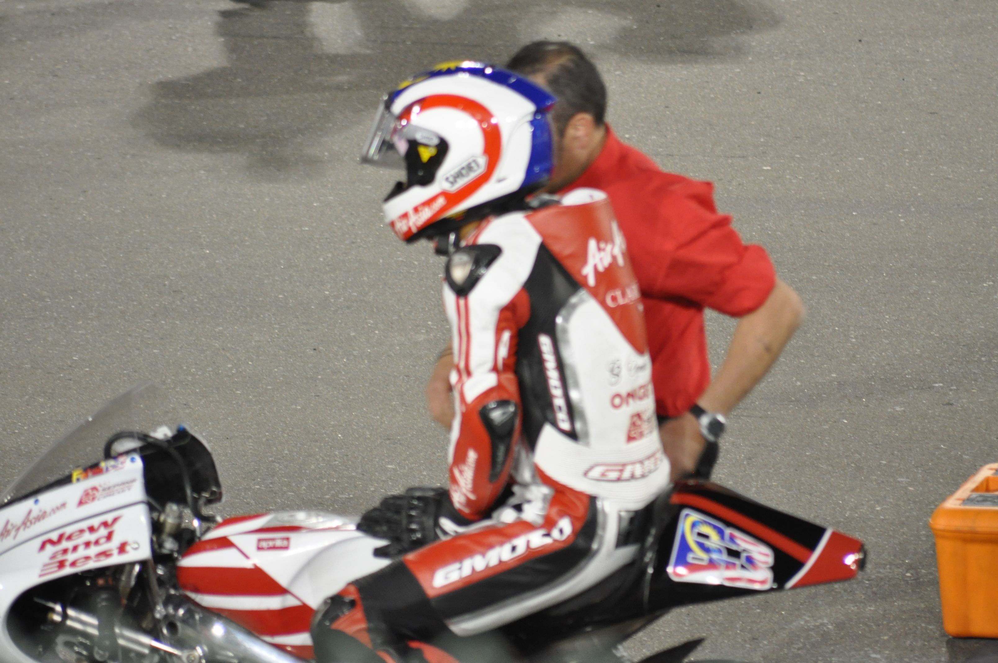 Zulfahmi Khairuddin a Losail nel 2010.